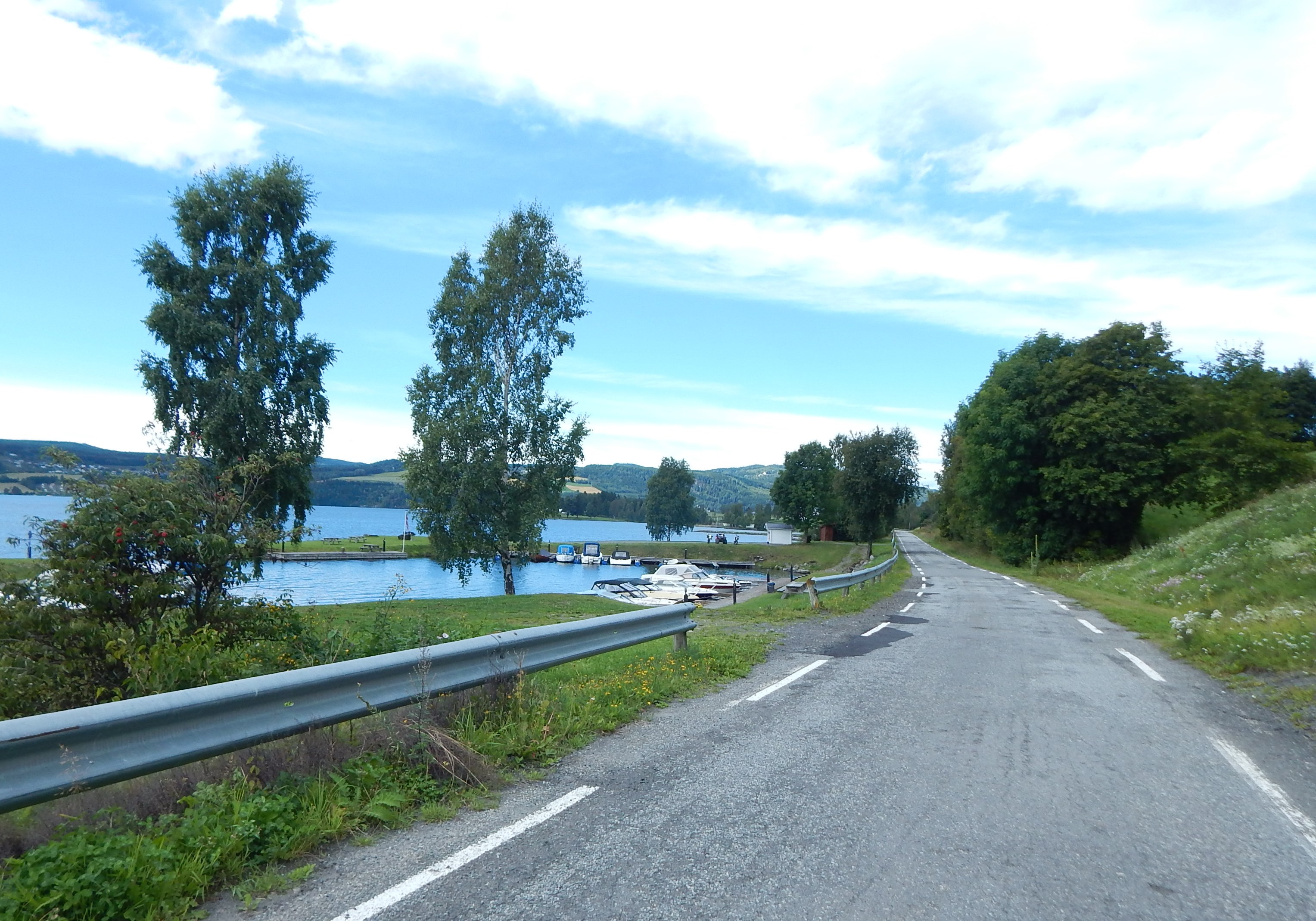 Tangnesvegen (fylkesvei 1760, tidl. 82) nord for Mengshol